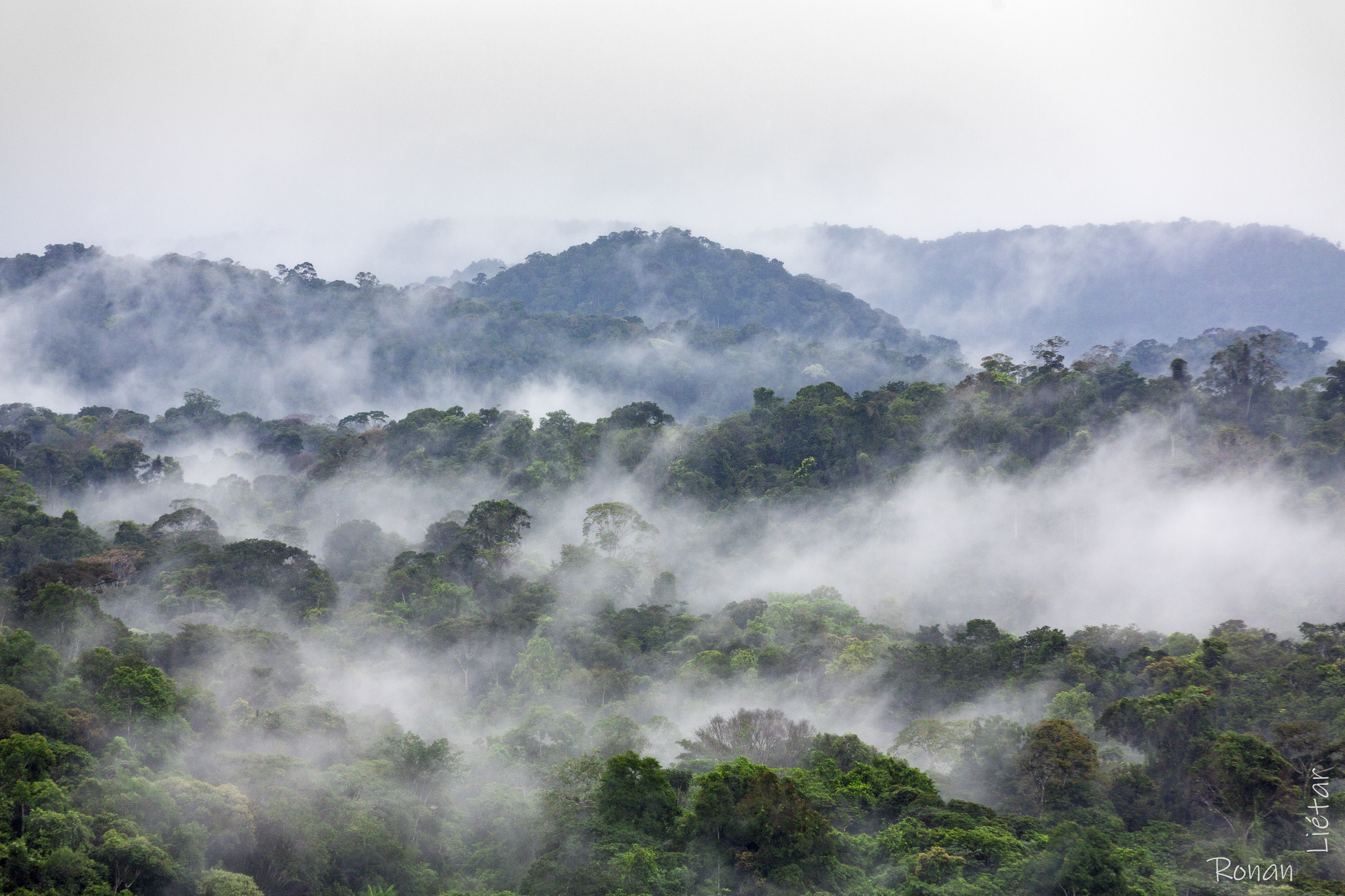 Canopée de la forêt amazonienne vue depuis le belvédère de Saül en Guyane